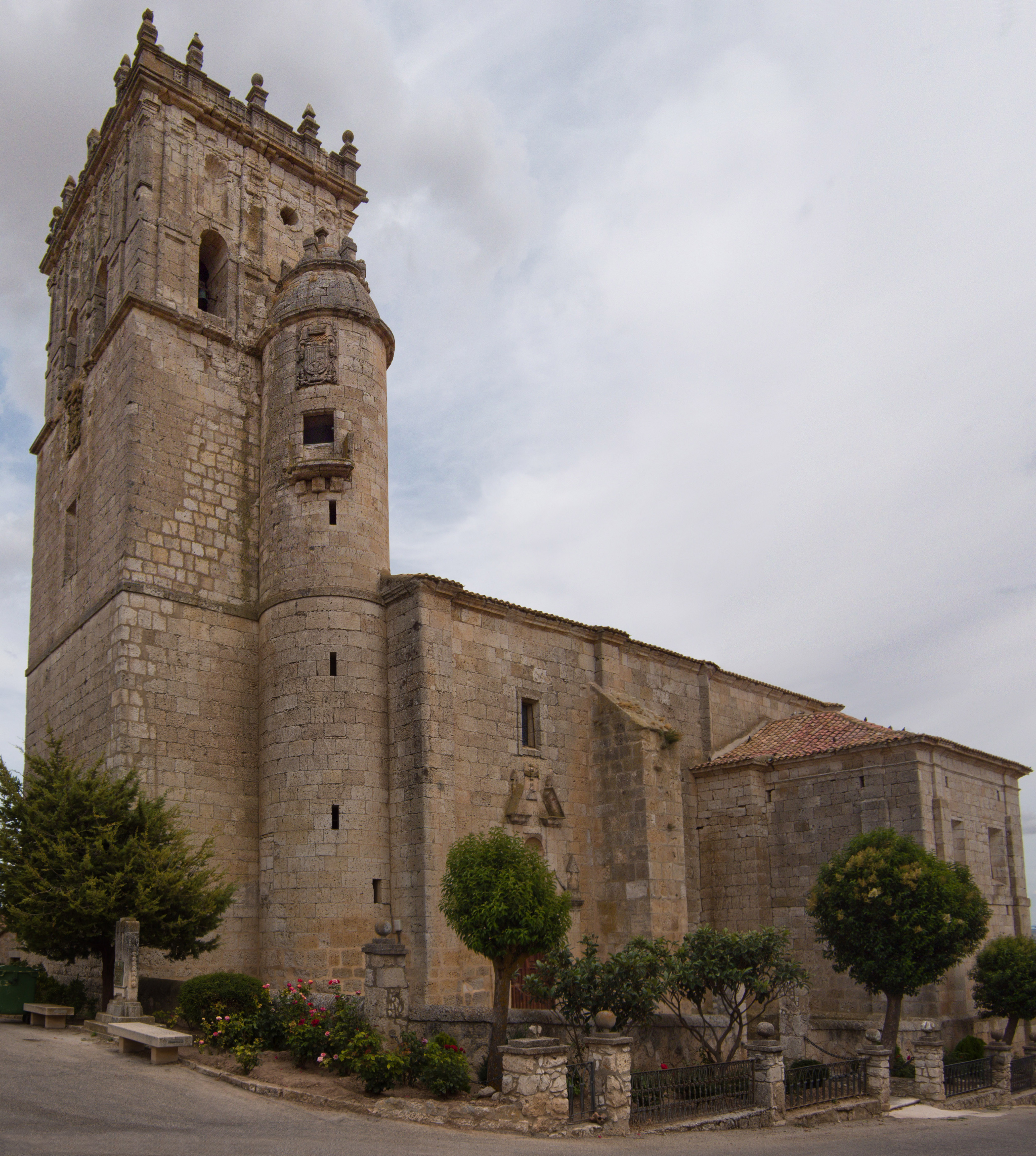 Iglesia Parroquial de San Juan Bautista